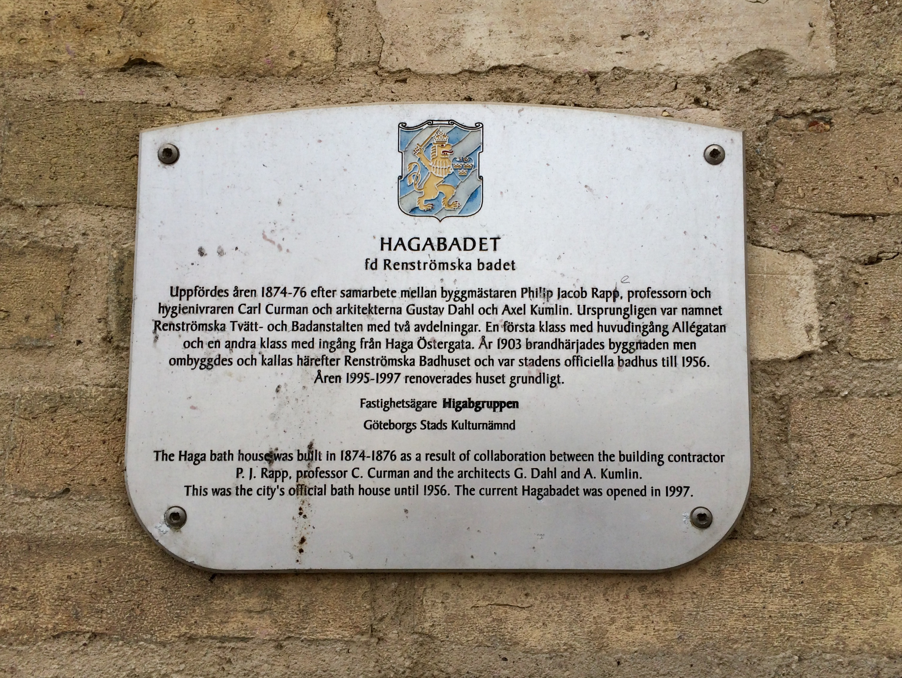 Minnesplakett, uppsatt i februari år 2000, vid Hagabadet i Göteborg. Plaketten sattes upp som en del av Göteborgs stads kulturnämnds "Projekt Husmärkning" kring åren 2000-2001 där drygt hundra skyltar ingick. Se även boken "100 utmärkta hus i Göteborg". Vid en inventering av kommunen gjord 2016 satt 69 skyltar fortfarande uppe.